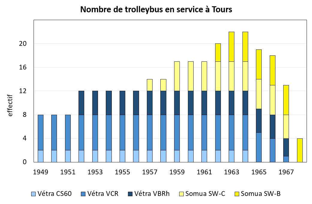 Effectif du parc de trolleybus à Tours de 1949 à 1968.